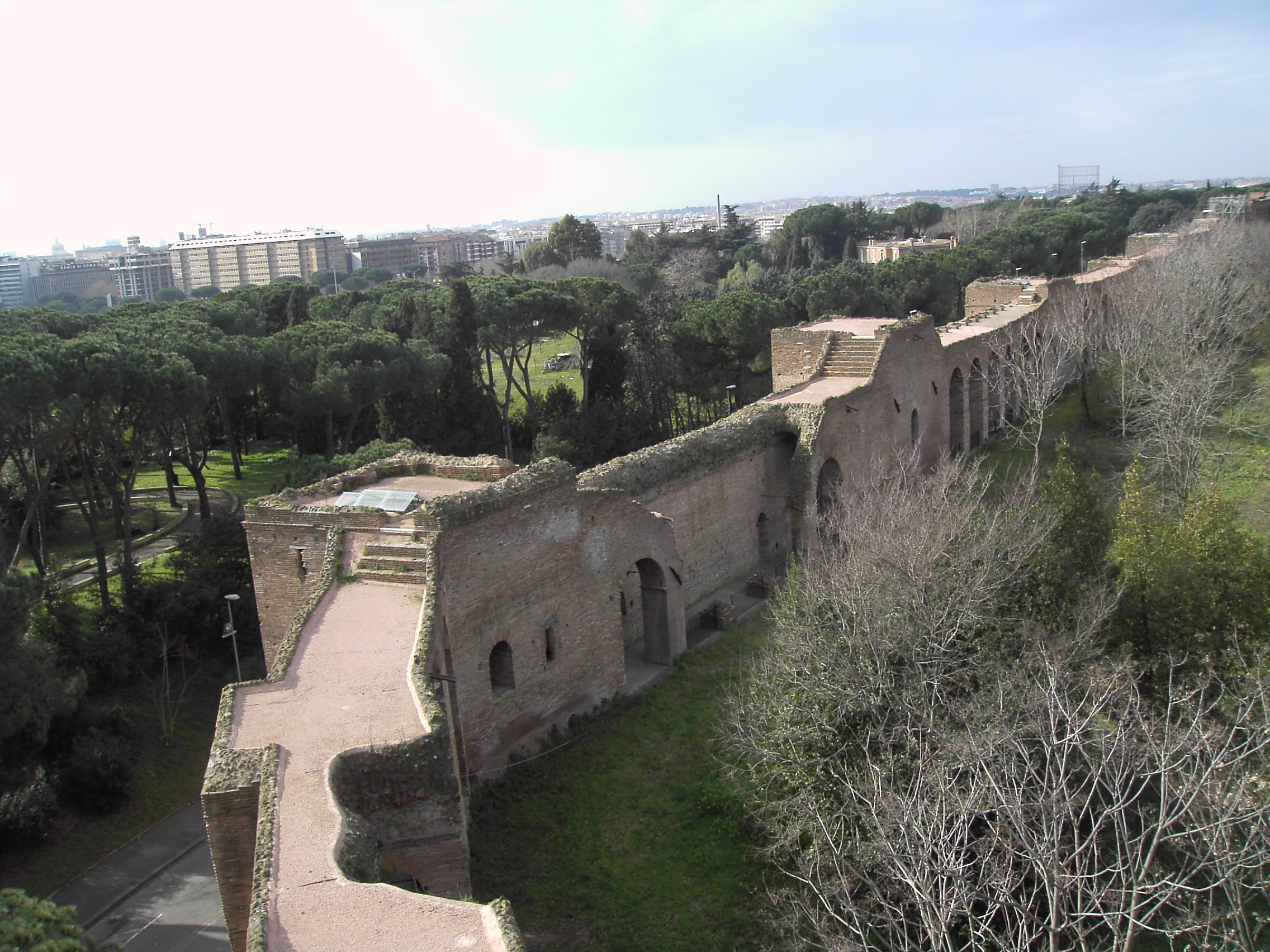 Roma , le mura Aureliane da porta sa Sebastiano a porta Ardeatina dalla torre di Porta s. Sebastiano